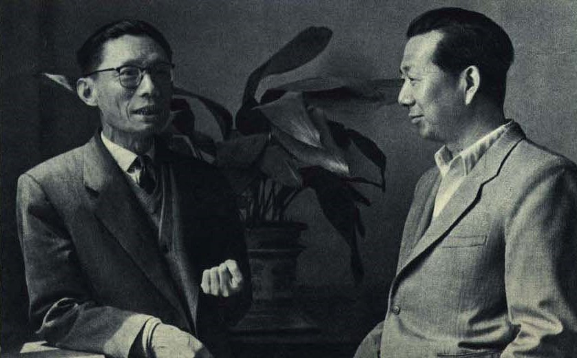 1962-07 1962年 百花奖最佳编剧夏衍、水华